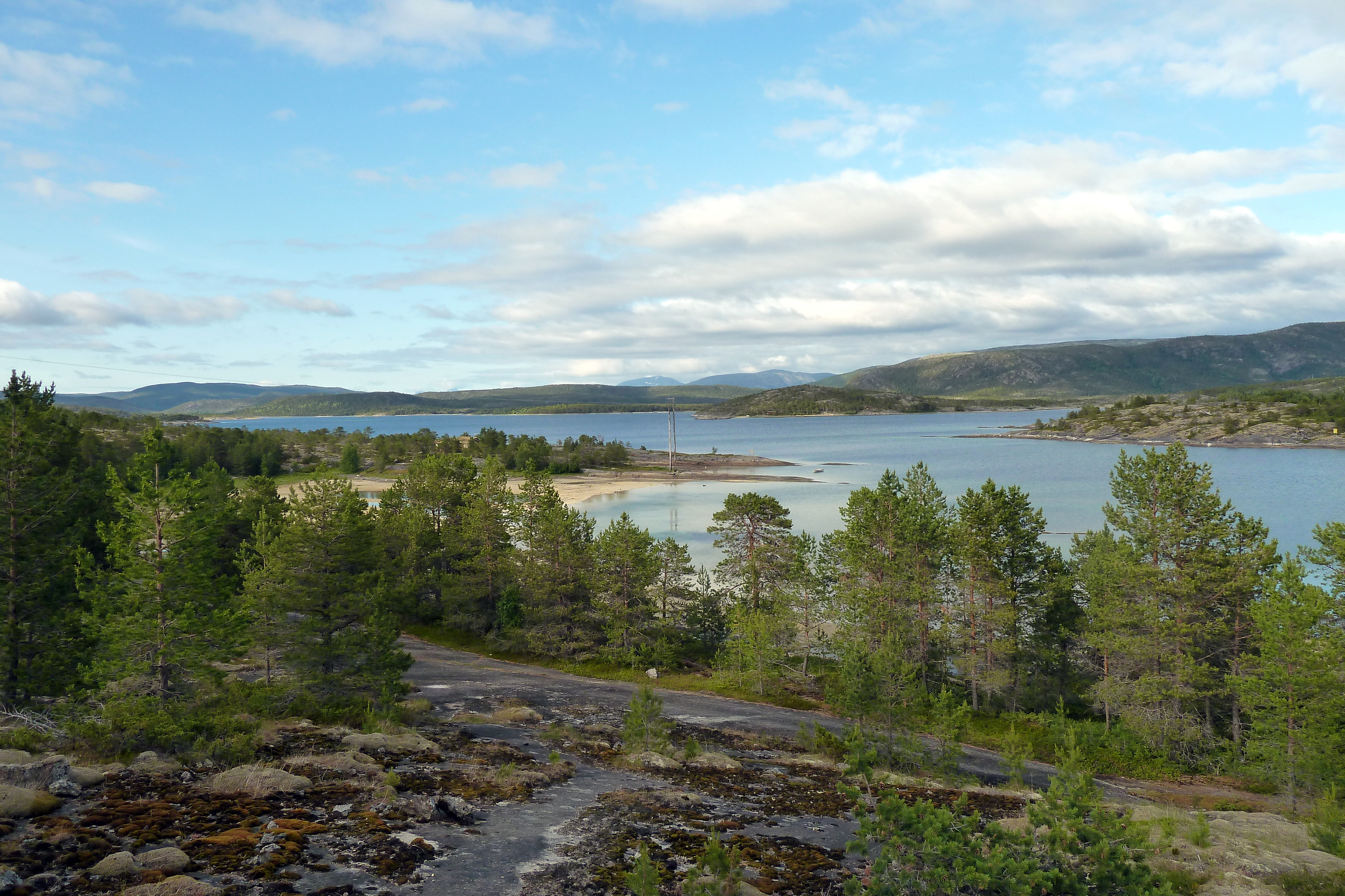 Innhavet i Hamarøy sett fra Straumsnesøya mot Sagpollen.